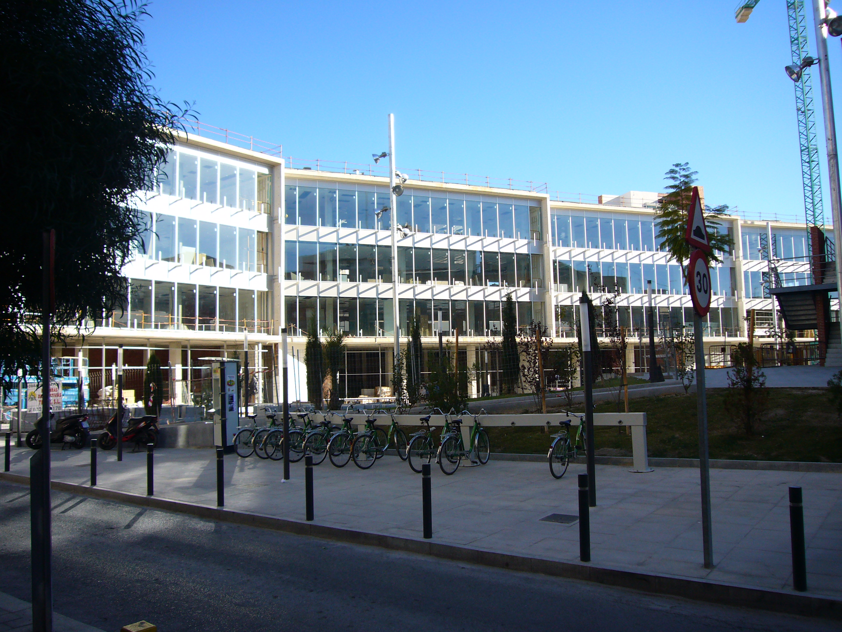 Fachada en construcción del nuevo Ayuntamiento de San Vicente del Raspeig.